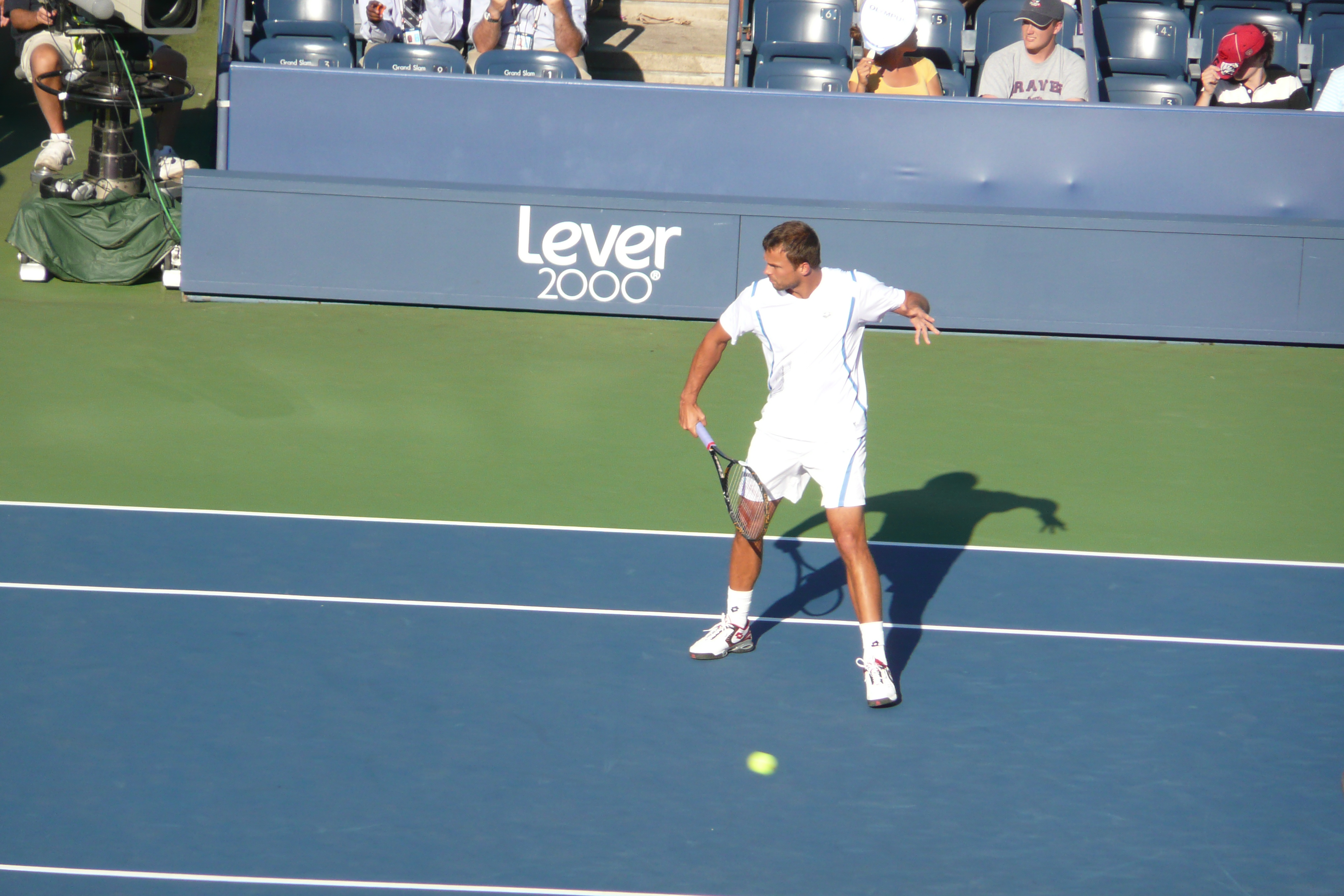 Lovro Zovko